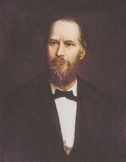 Porträt von Andreas Kornhuber (1825–1905), Rektor der Technischen Hochschule Wien